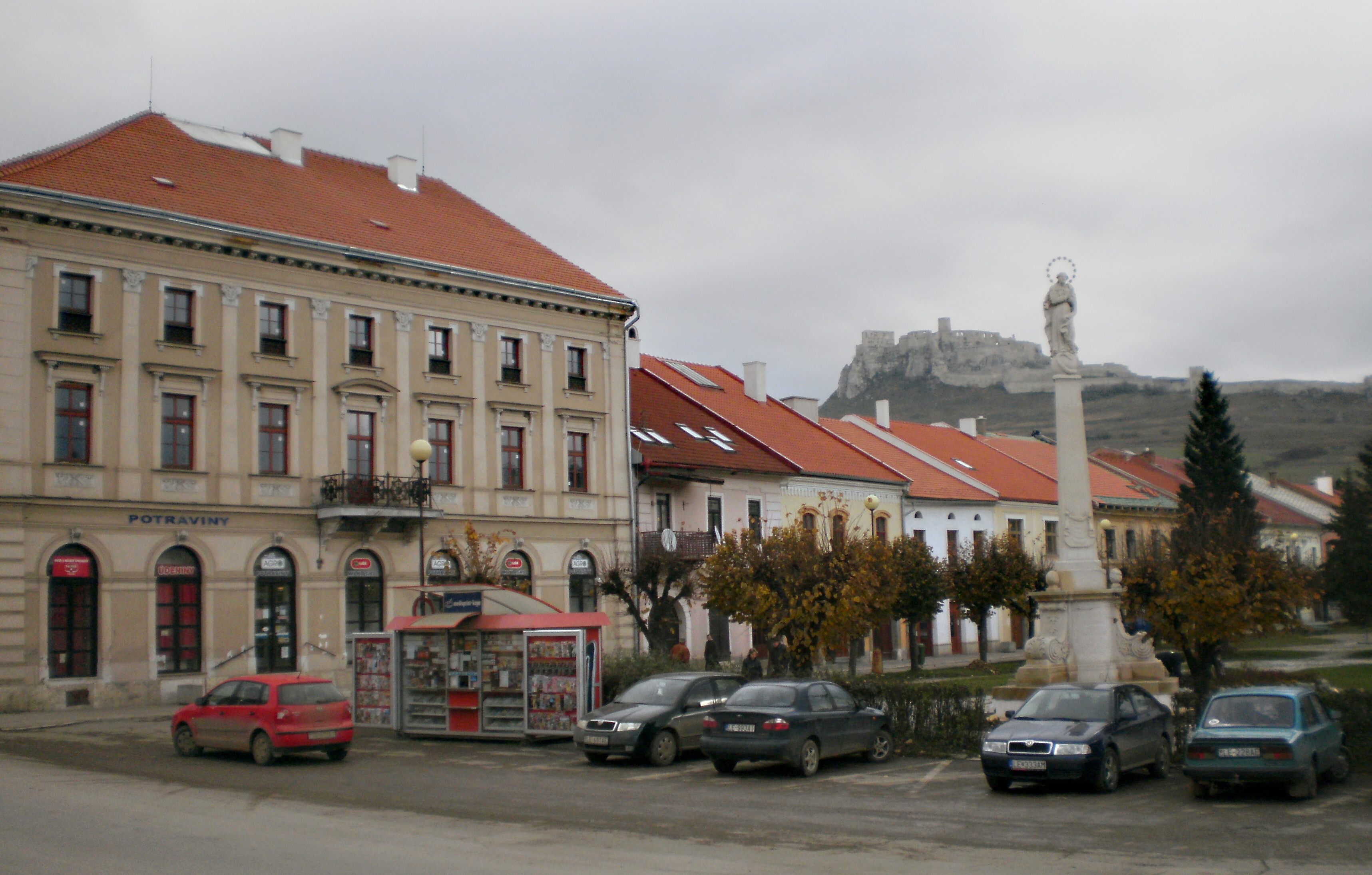 Spišské Podhradie